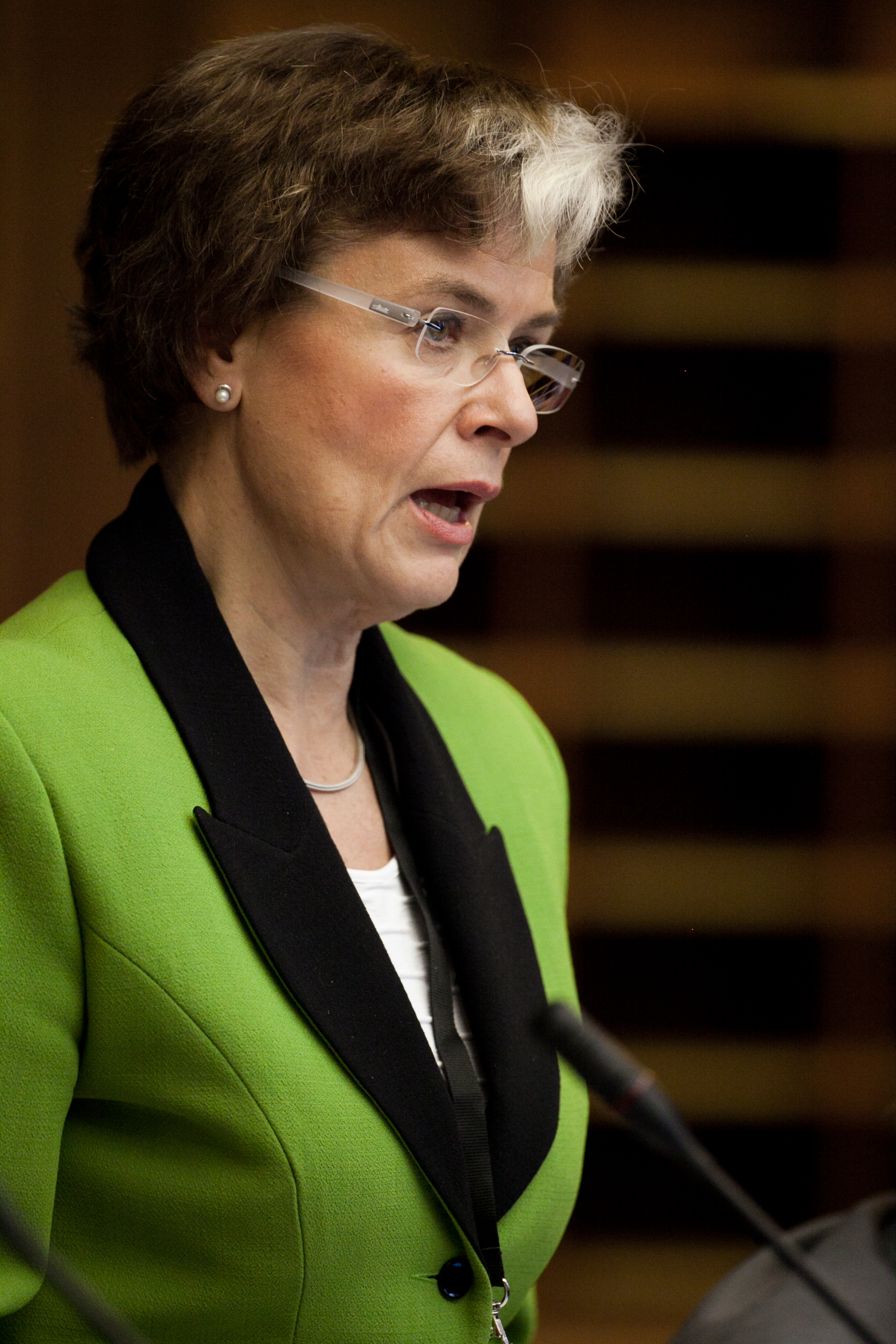 Nordiska Rådets session 2011 i Köpenhamn.